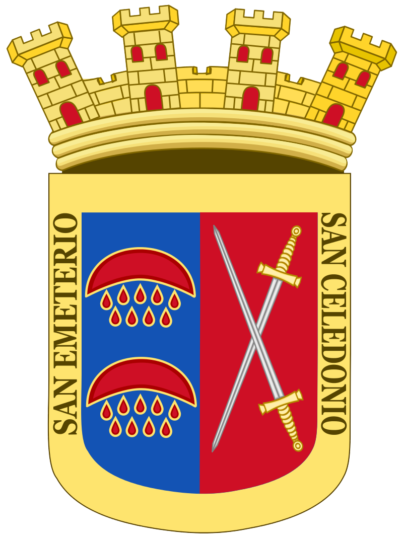 Escudo de la muy noble, muy leal, fiel, antiquísima y heroica Ciudad de Calahorra.